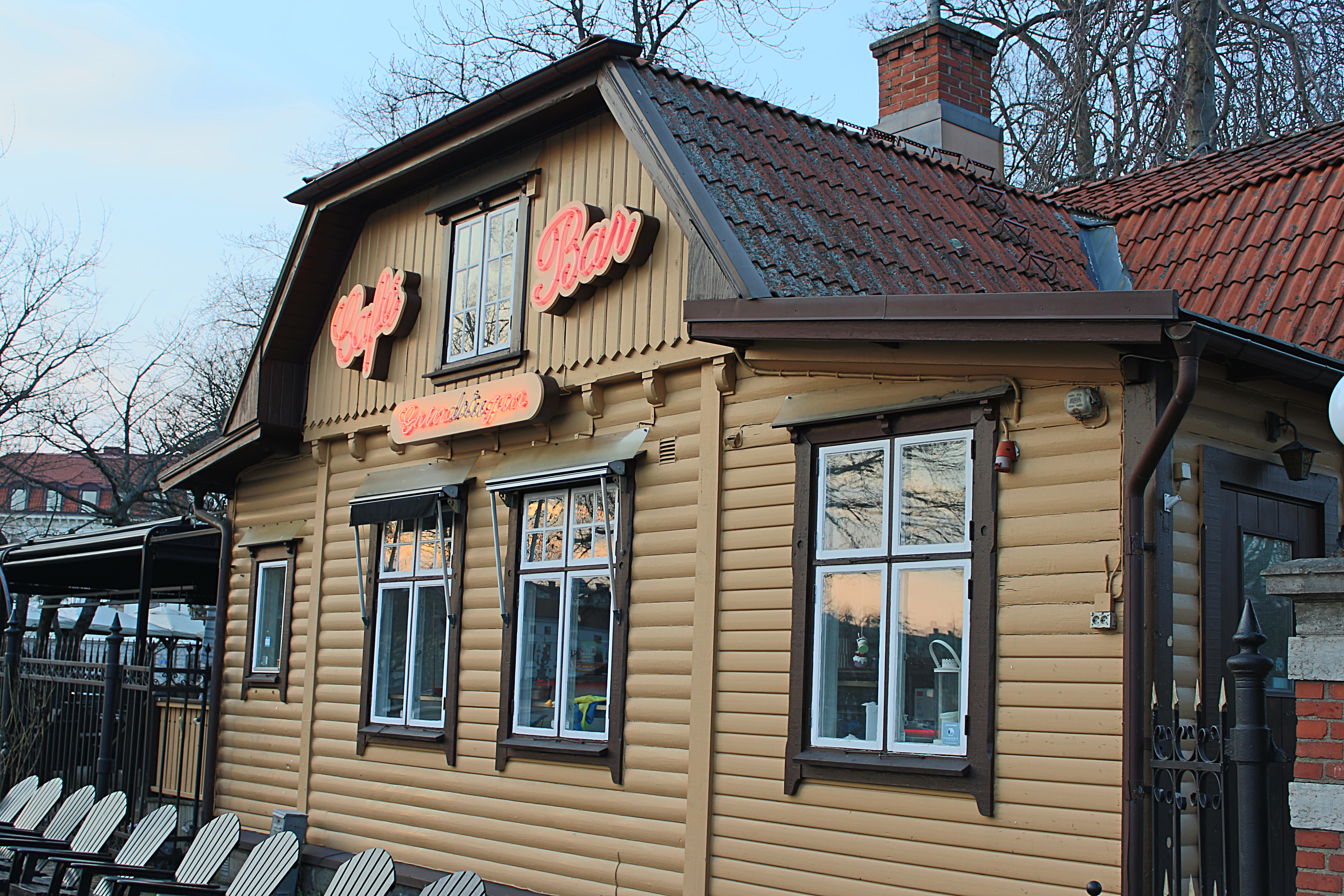 Café Grindstugan vid västra entrén.